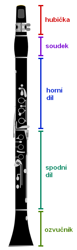 klarinetové díly, přeloženo z německé Wikipedie Licensing původní autor